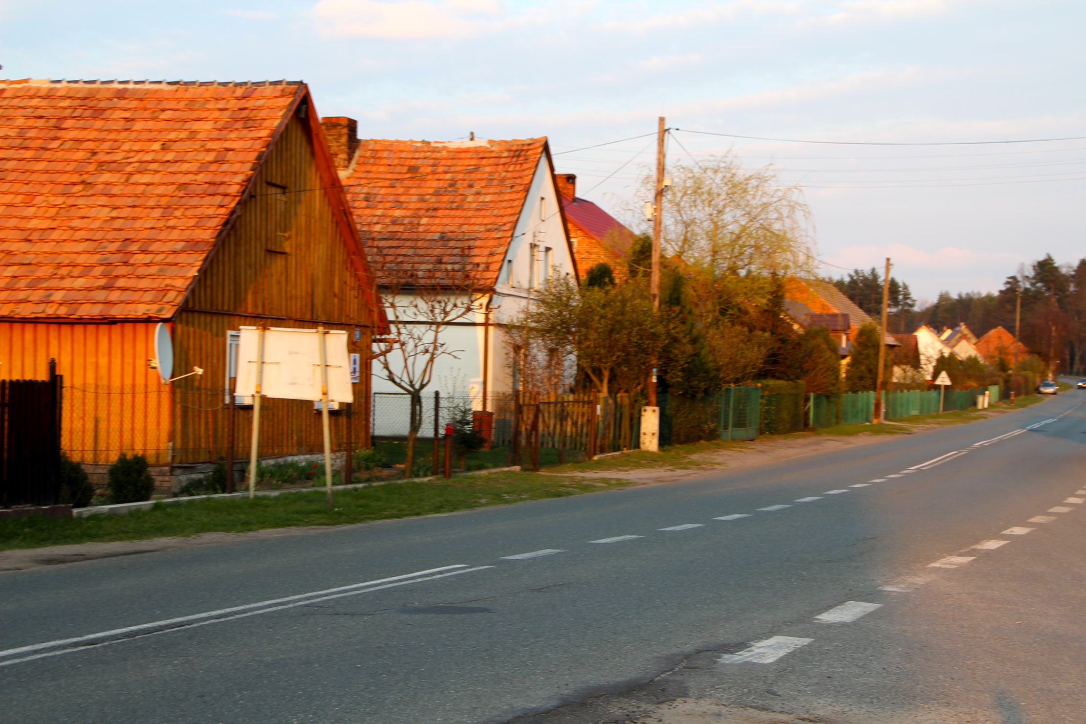 Rudno – wieś w Polsce w województwie dolnośląskim, w powiecie wołowski, w gminie Wołów.